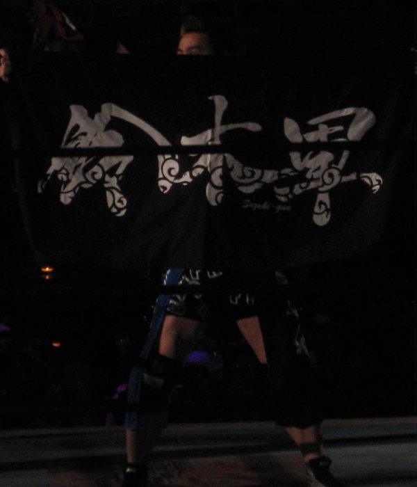 2014年3月23日 ベイコム総合体育館 「NEW JAPAN CUP Final」 鈴木軍のロゴバスタオルを掲げるTAKAみちのく